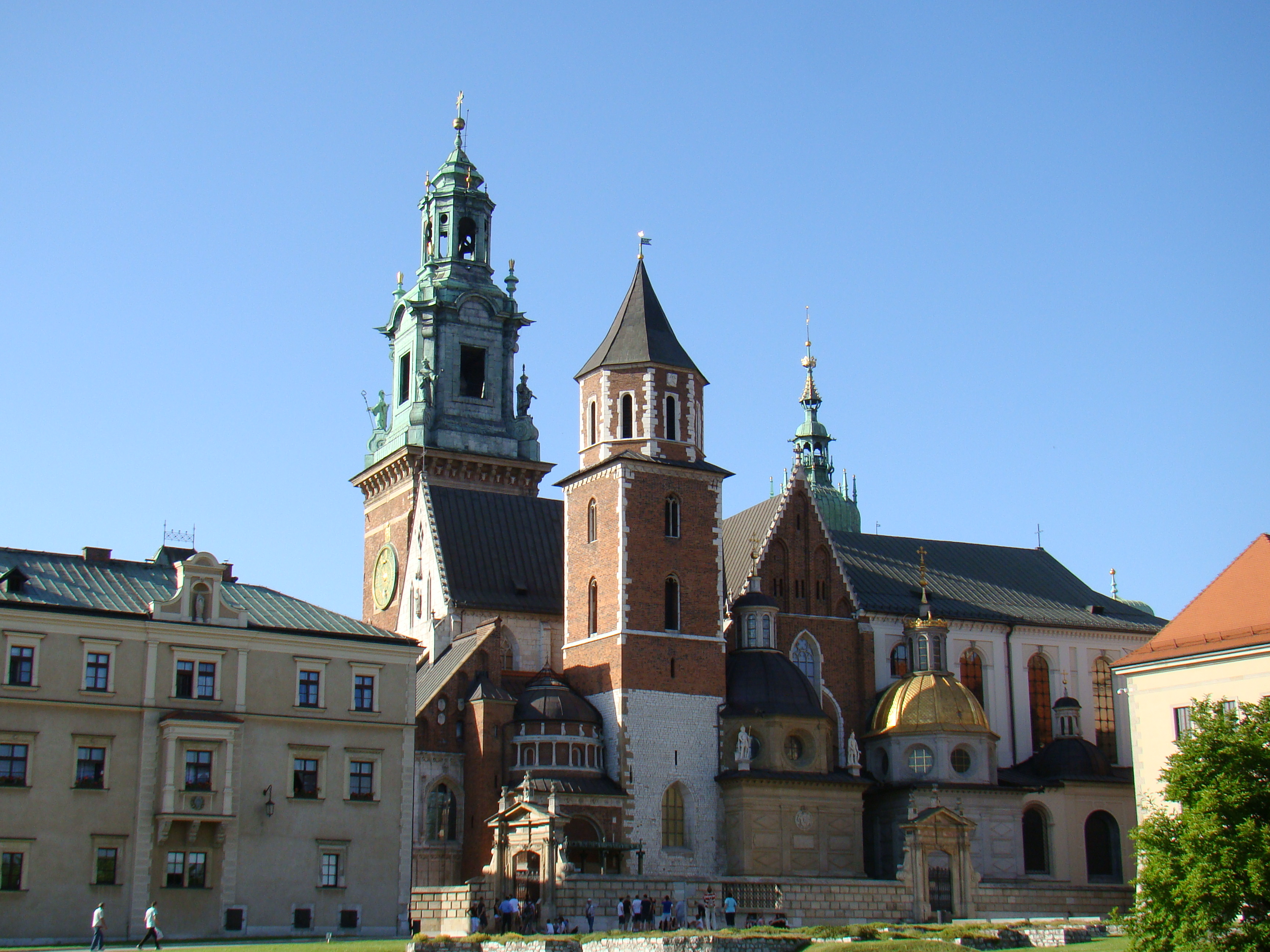 Kraków, katedra pw. śś. Wacława i Stanisława Biskupa, XI/XII, XIV, XIX